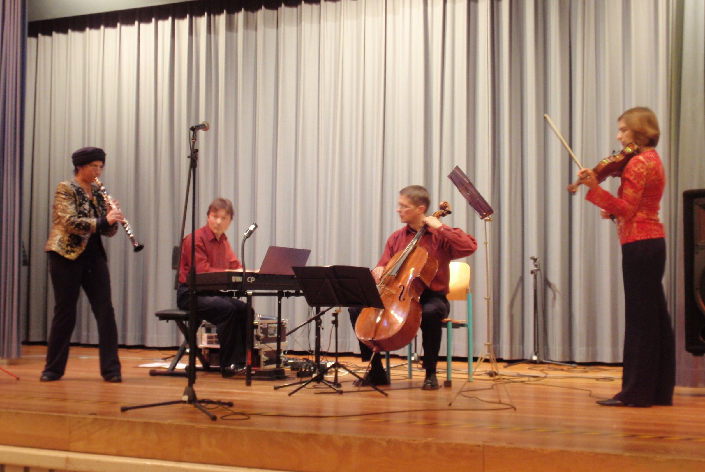 das Klezmer-Ensemble Colalaila im November 2008 während eines Konzerts in Alsbach-Hähnlein, Hessen